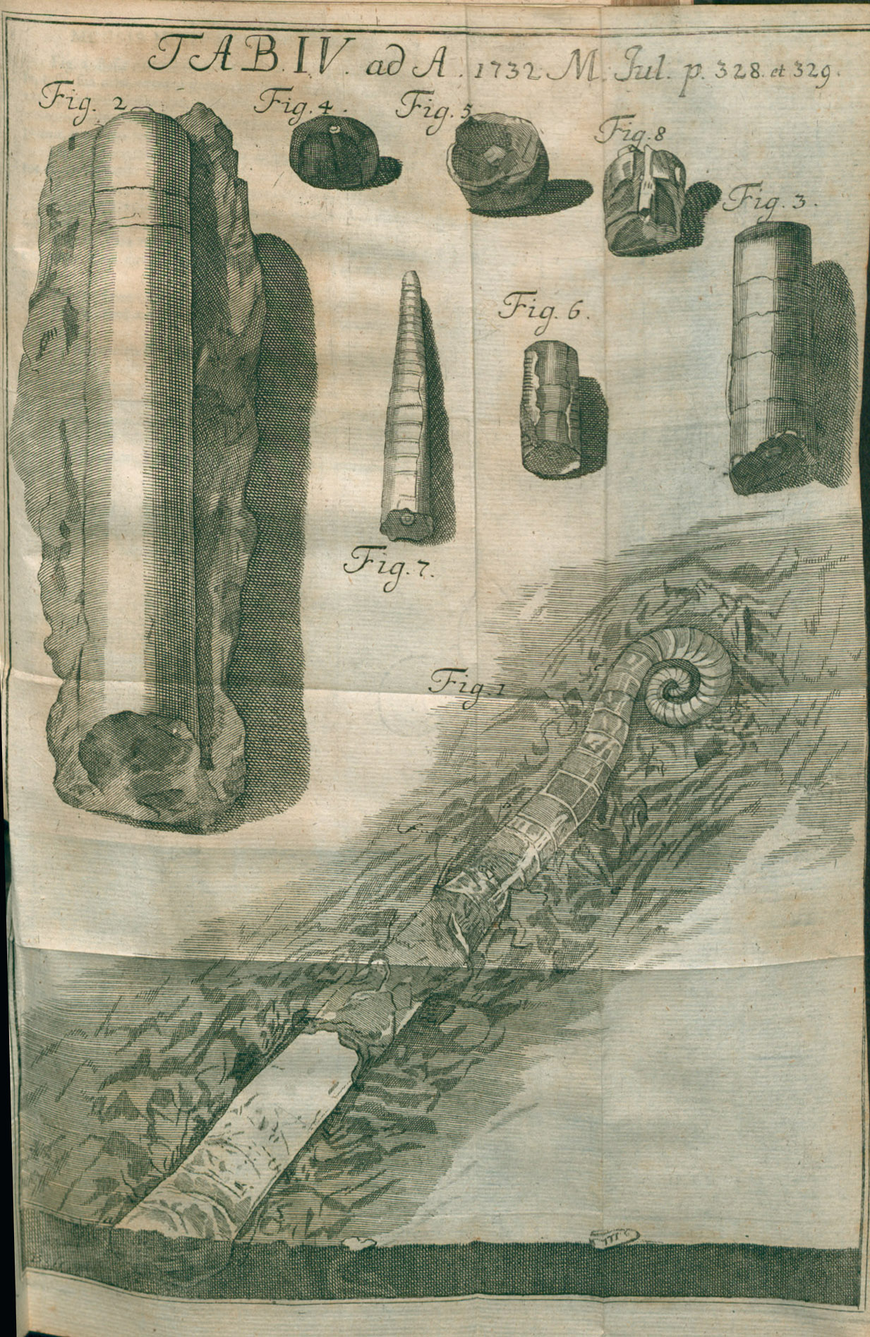 Illustration